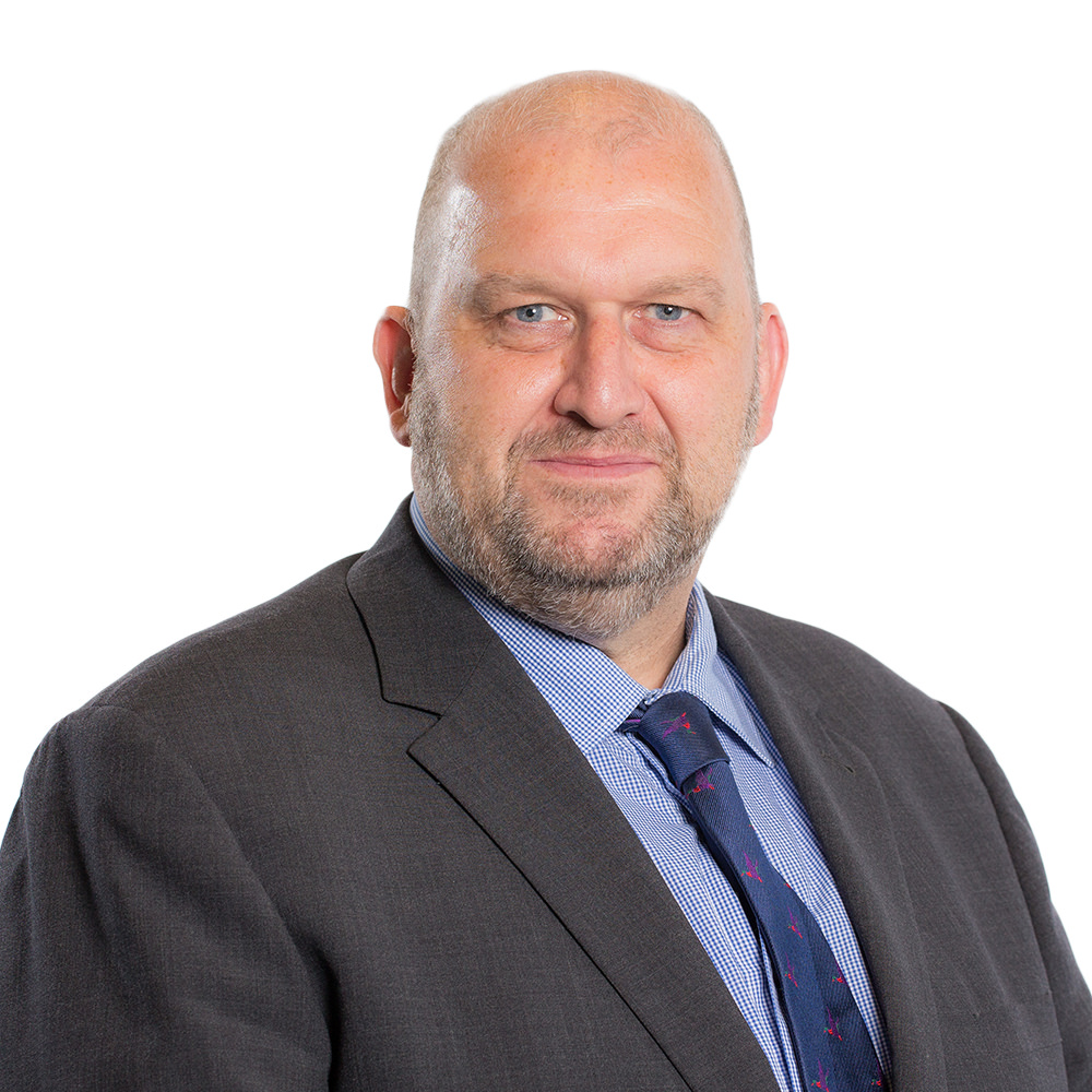 laid: Llafur Cymru Etholaeth: Alun a Glannau Dyfrdwy Party: Welsh Labour Constituency: Alyn and Deeside